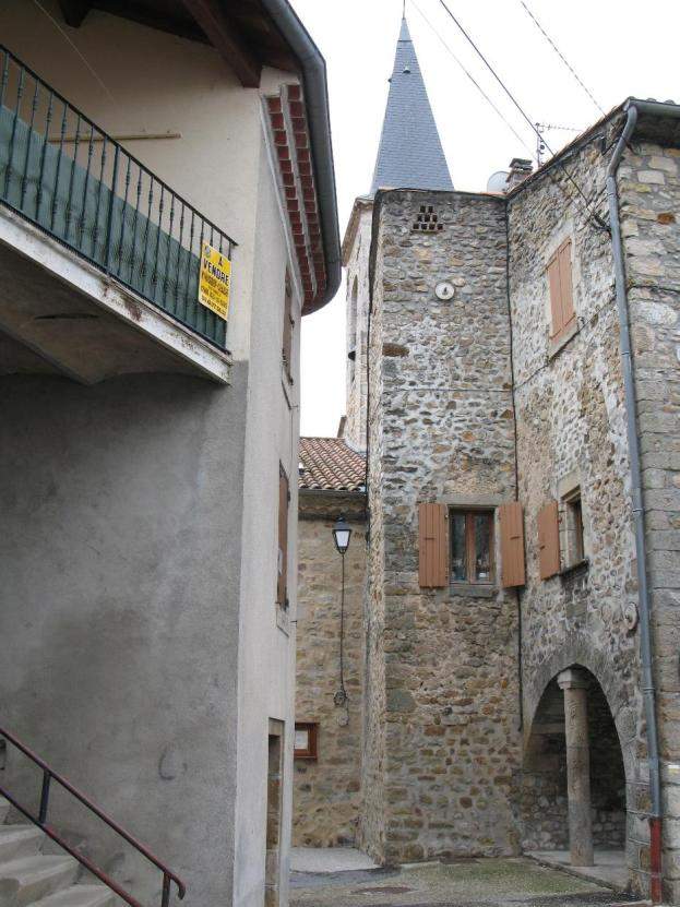 Village de Uzer (Ardèche)